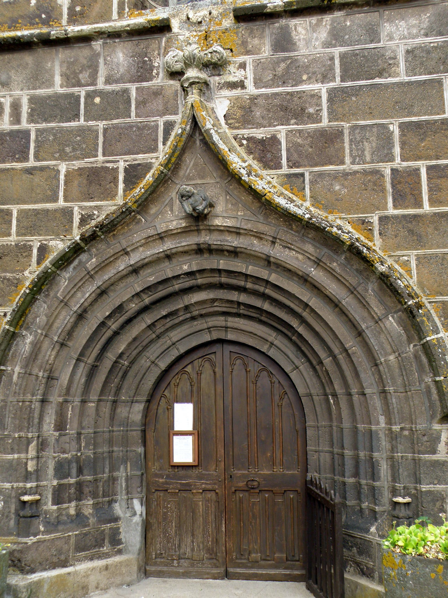 Le Brignon, comm. de la Haute-Loire, France (région Auvergne). Portail de l'église Saint-Martin.